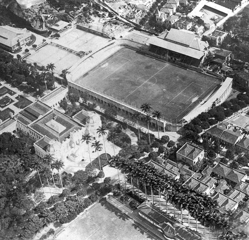 Estádio do Fluminense Football, Rio de Janeiro.